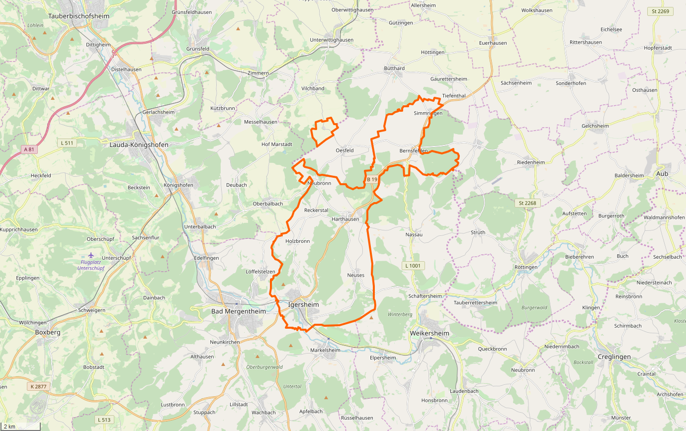 Gemarkung und Lage der Gemeinde Igersheim. Siehe auch: Liste der Kulturdenkmale in Igersheim. Liste der Straßennamen von Igersheim. Gemarkungen und Lagen der Städte und sonstigen Gemeinden im Main-Tauber-Kreis: Ahorn · Assamstadt · Bad Mergentheim · Boxberg · Creglingen · Freudenberg · Großrinderfeld · Grünsfeld · Igersheim · Königheim · Külsheim · Lauda-Königshofen · Niederstetten · Tauberbischofsheim · Weikersheim · Werbach · Wertheim · Wittighausen